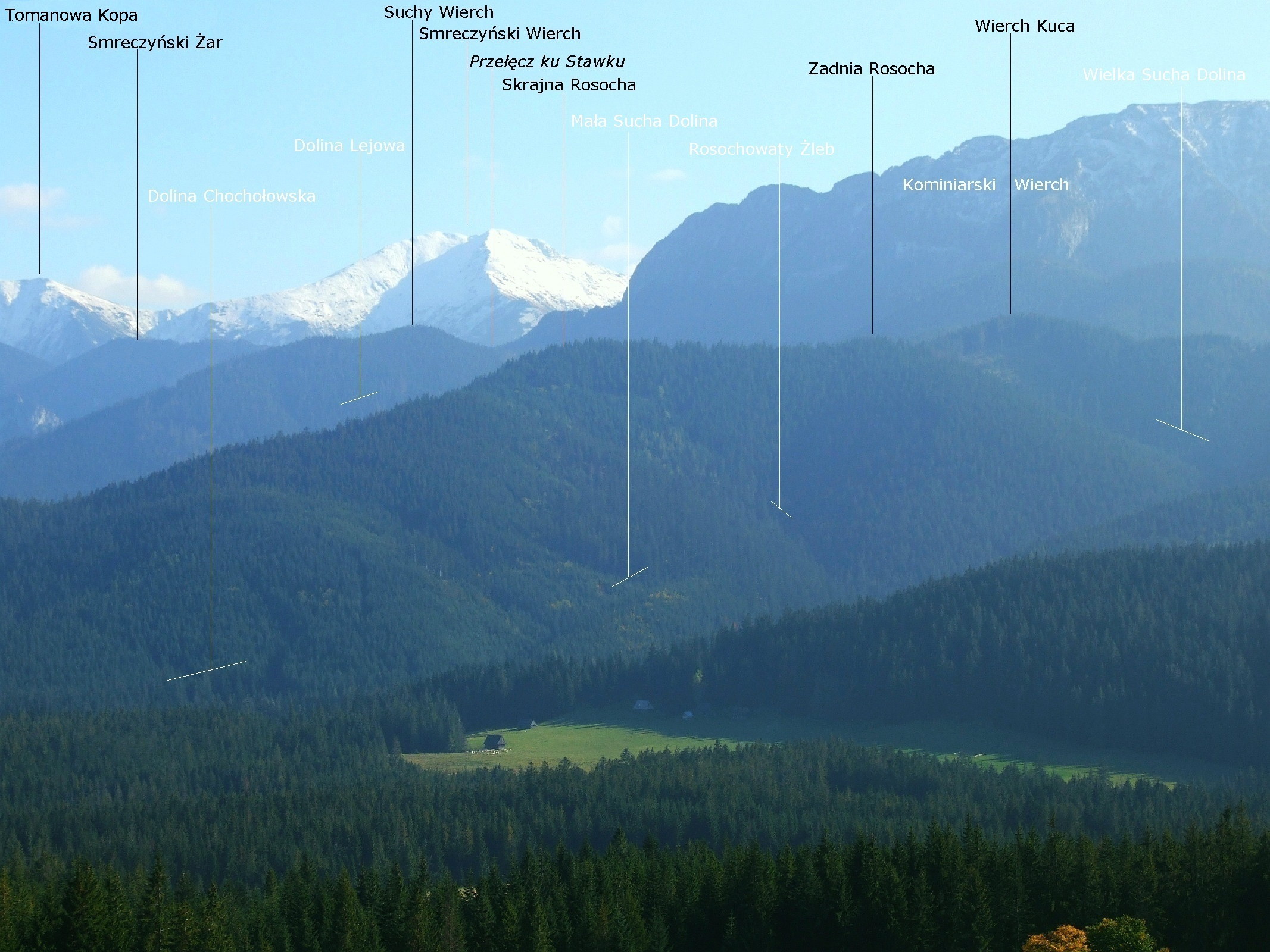 Widok z polany Koszarzyska na Przysłopie Witowskim